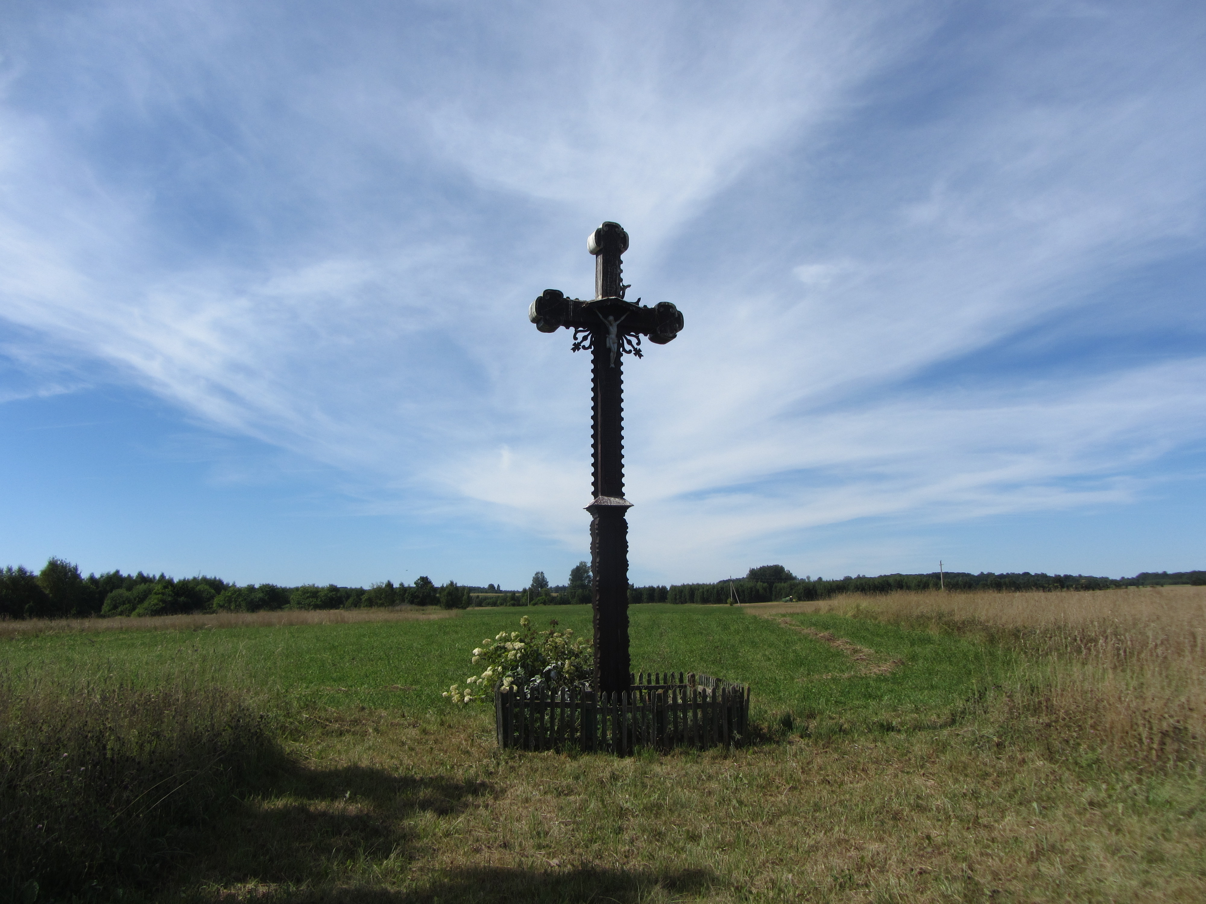 Užpalių sen., Lithuania